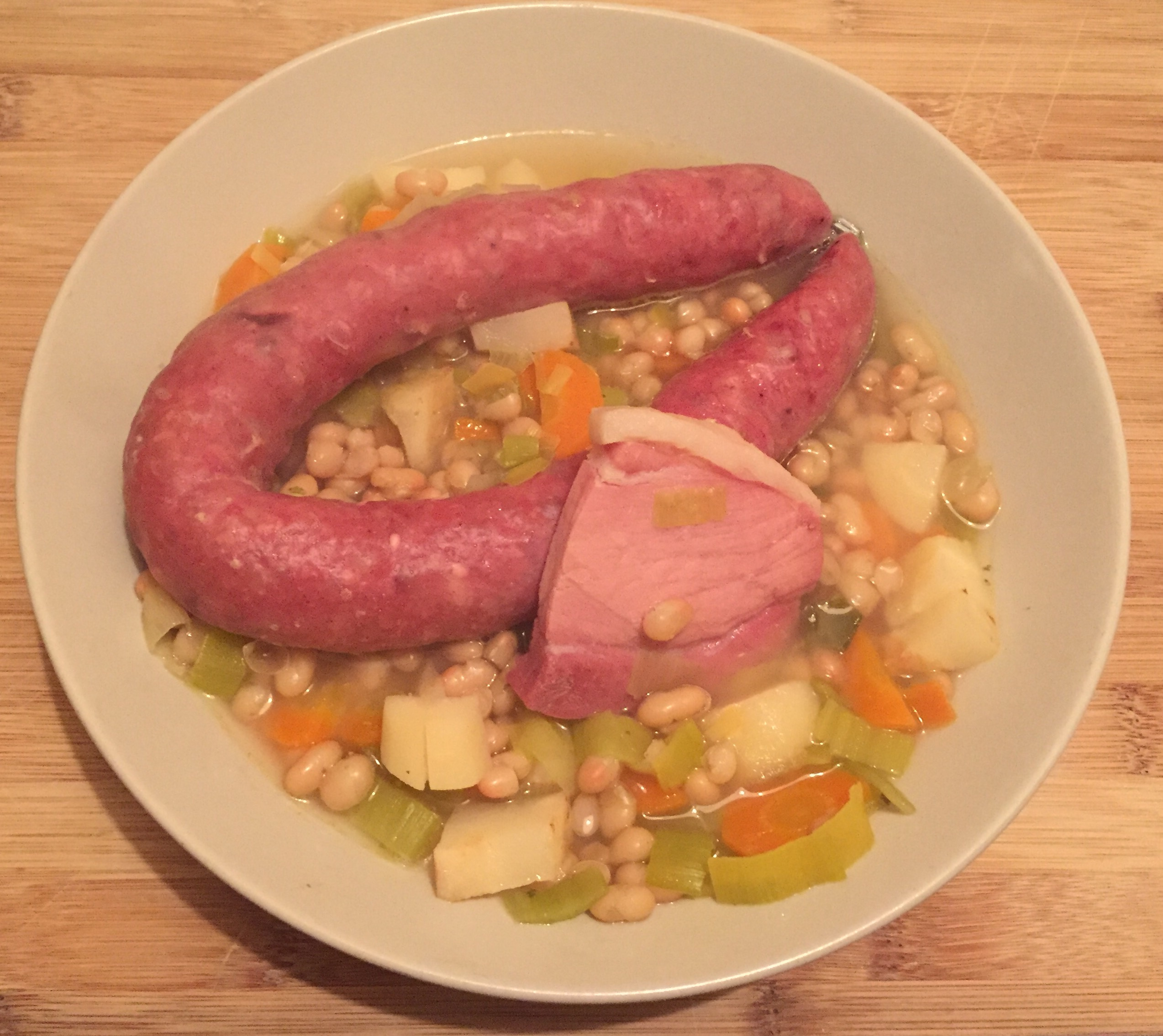 Ostfriesischer Bohneneintopf mit Schinken und Mettwurst.